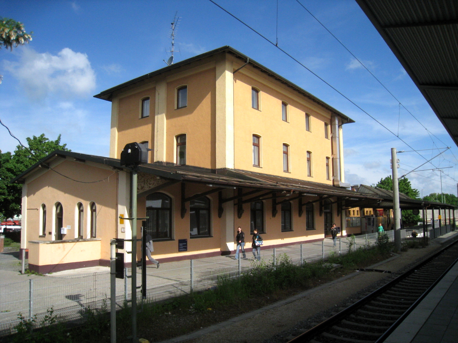 Dachau Station Platform